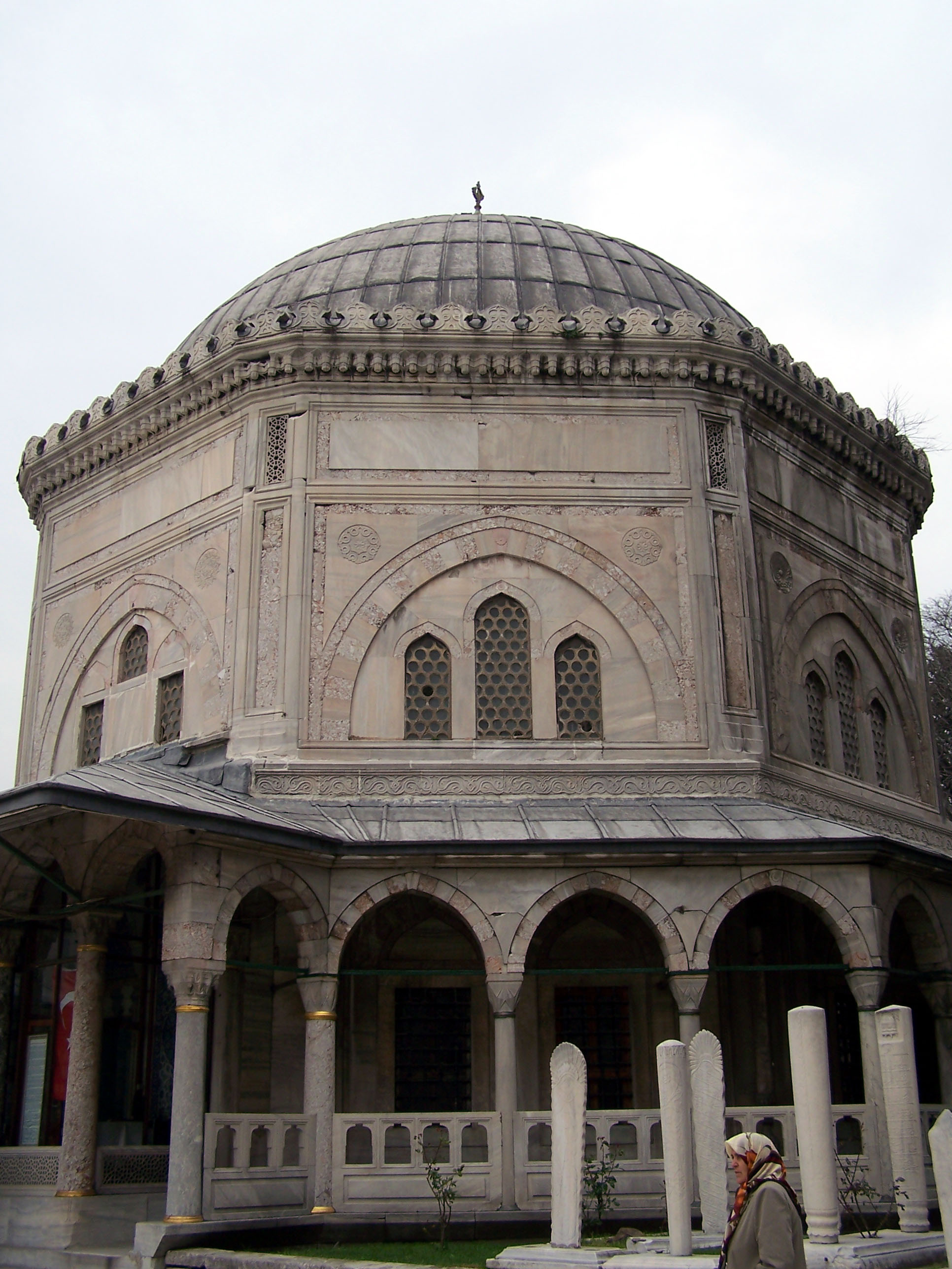 Türbe (tomb) of Sultan Süleyman at Süleymaniye Camii in Fatih, İstanbul, Turkey